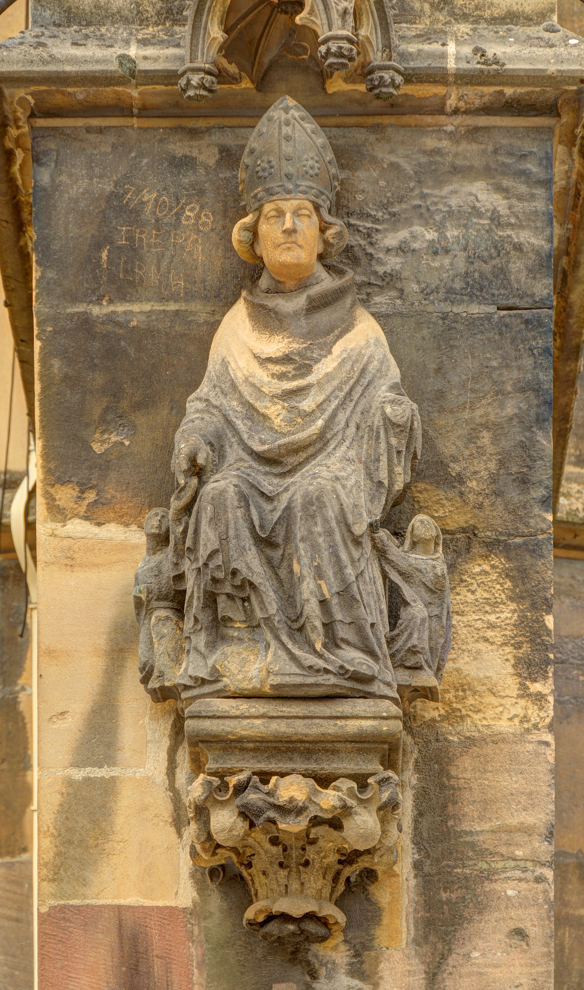 Collégiale Saint-Thiébaut de Thann, classée Monument Historique sous le n°PA00085696 : statue de St Thiébaut accompagné de deux pélerins (HDR).